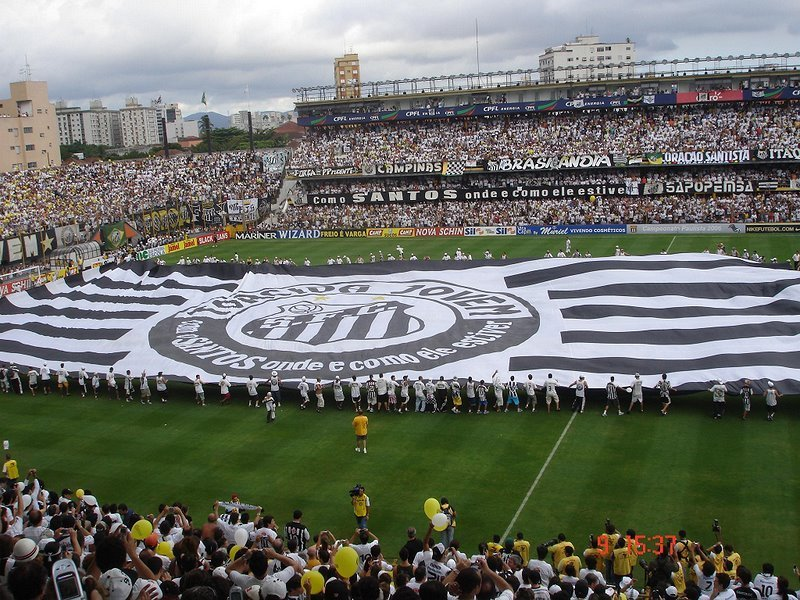 Estadio Urbano Caldeira,campo do santos fc,Brasil